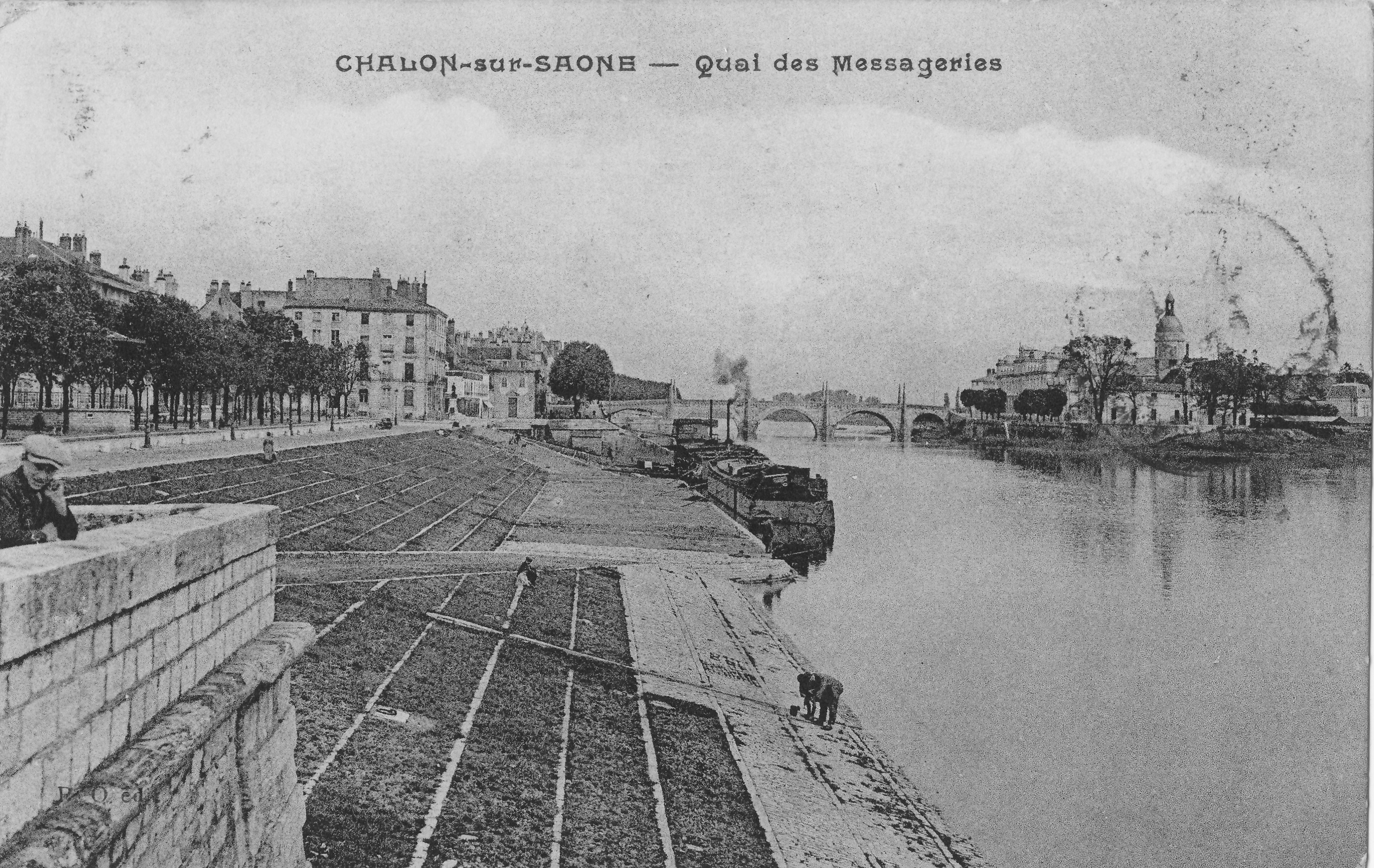 Carte postale ancienne montrant le quai des messageries à Chalon-sur-Saône vers 1929